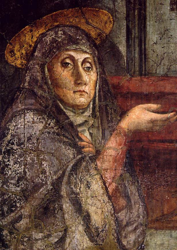 detail